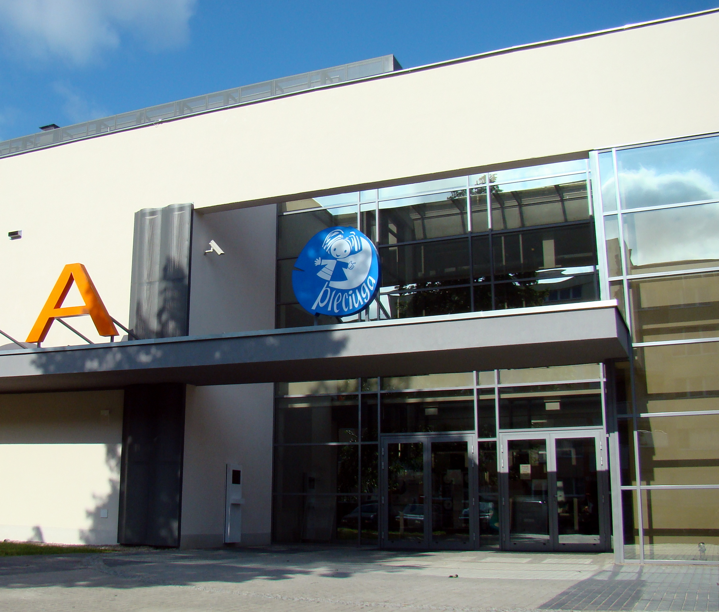 Teatr Lalek Pleciuga, Szczecin, Polska